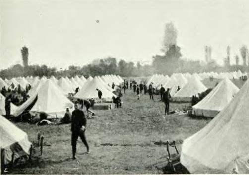 Campamento militar otomano, hacia 1904.